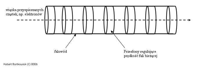 Schematyczny rysunek ukazujący budowę akceleratora liniowego z falą bieżącą.